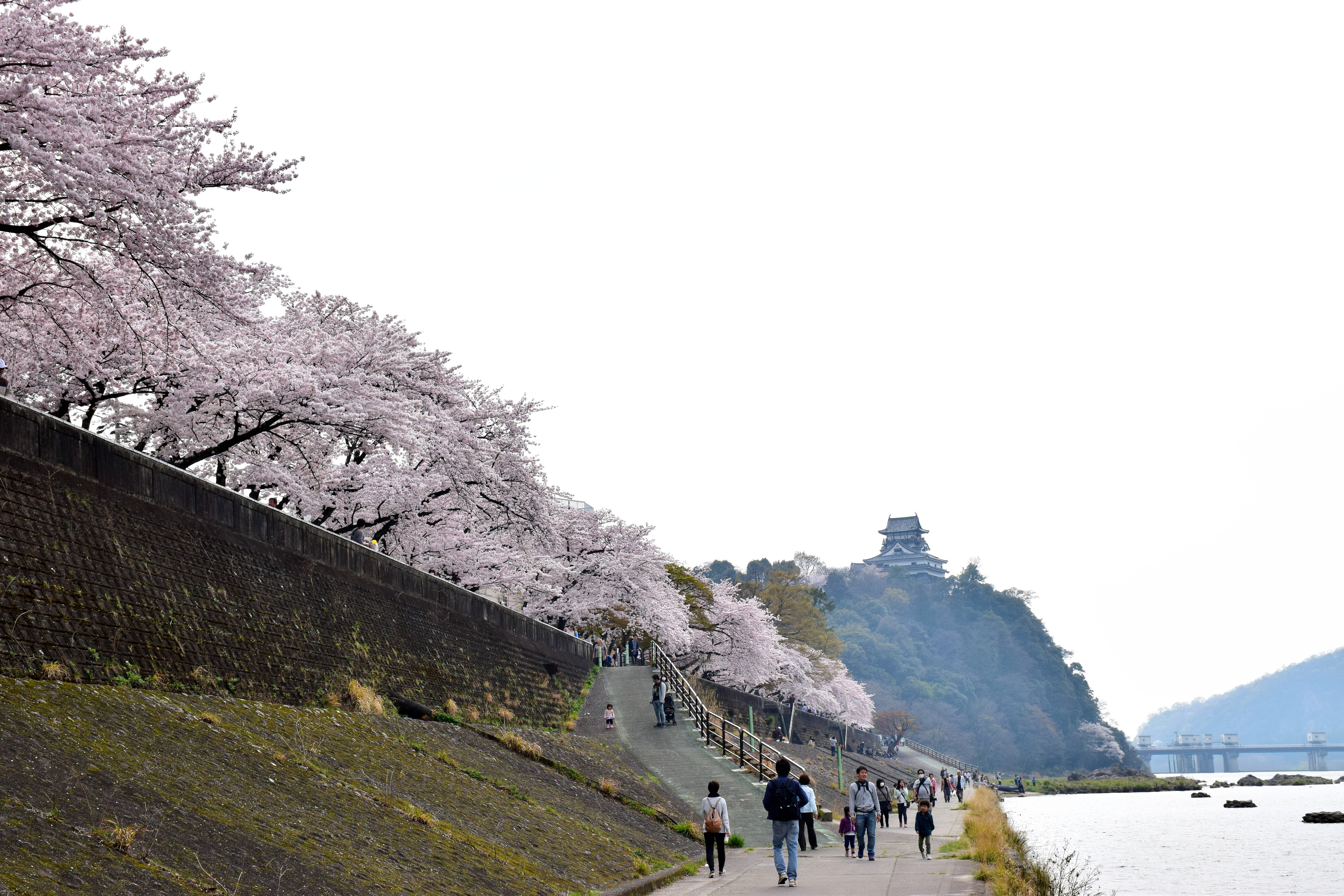 東側からの犬山城